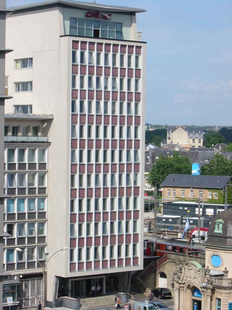 Foto vun Der Eisebunnsdirektioun hirem Gebai am Joer 2007